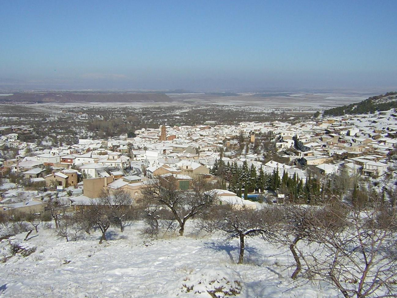 Aldeire (Granada, España)